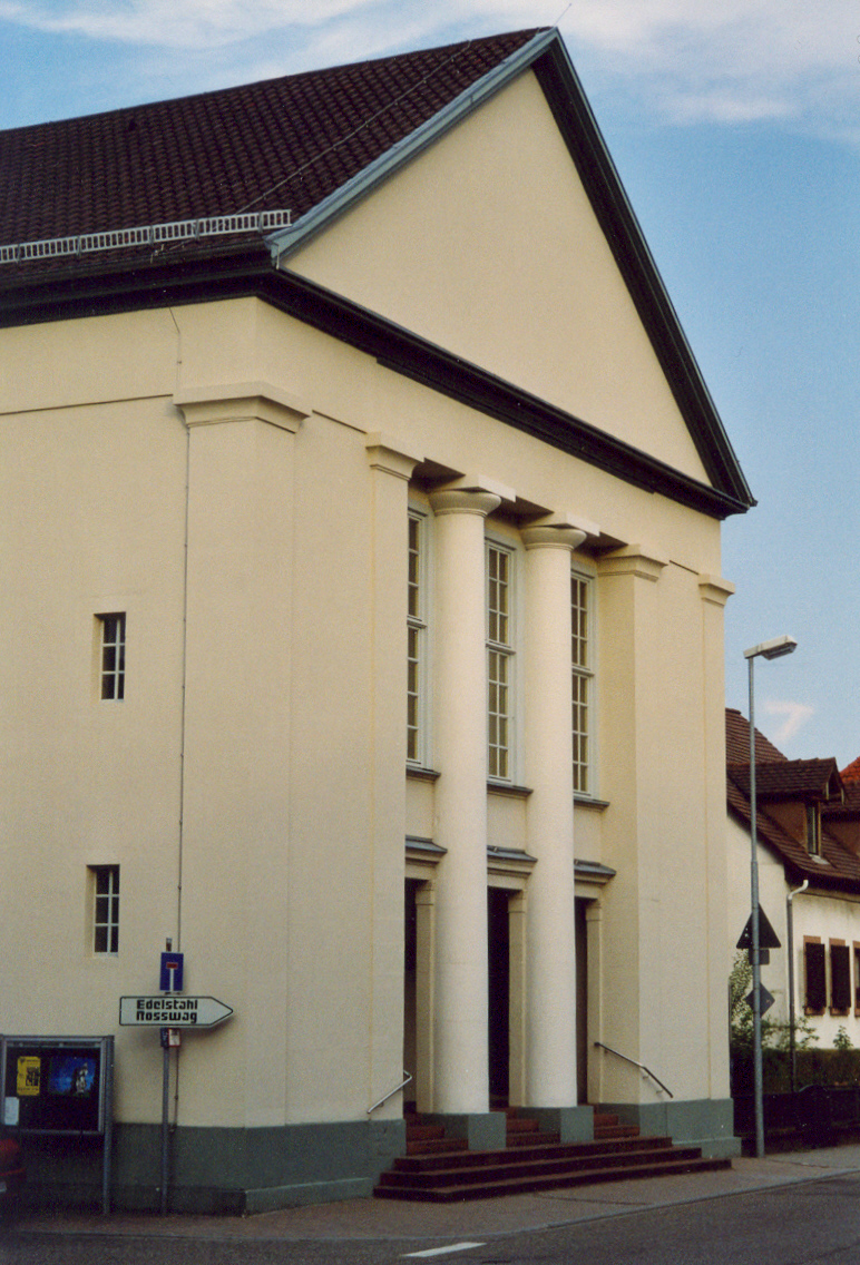 Im Ortsteil Kleinsteinbach steht eine der schönsten Kirchen des Weinbrenner-Klassizismus in Baden. Sie wurde von 1806-17 von Friedrich Weinbrenner selbst entworfen. Der Kirchturm mit einem für Weinbrenner geradezu verspielten Glockengeschoss steht auf der Rückseite des Langhauses. Und die zur Hauptstraße zeigende Vorderseite erbringt eine originelle Interpretation des klassizistischen Standardthemas, der antiken Tempelfront.